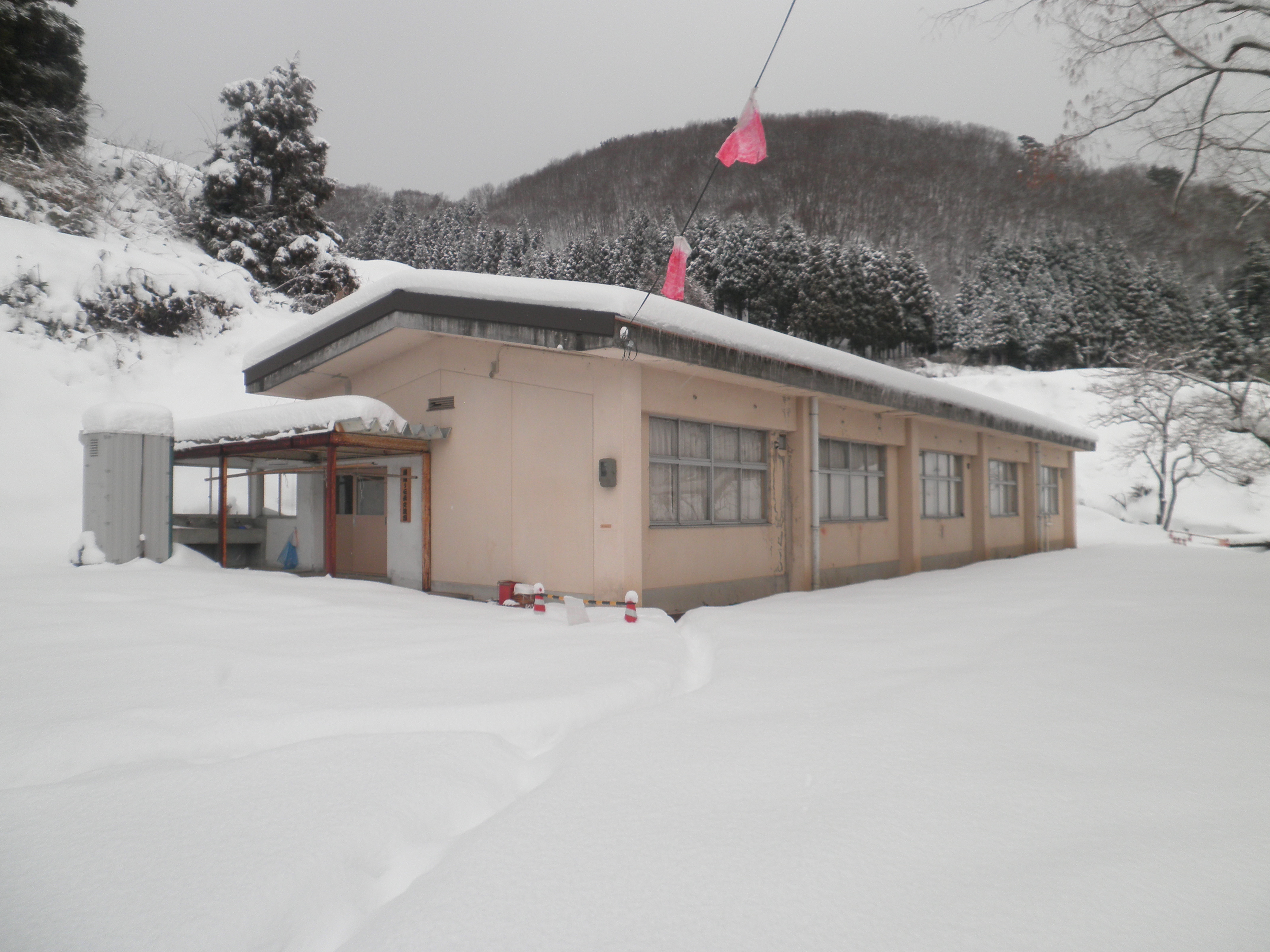 宮津市上世屋地区(12月)